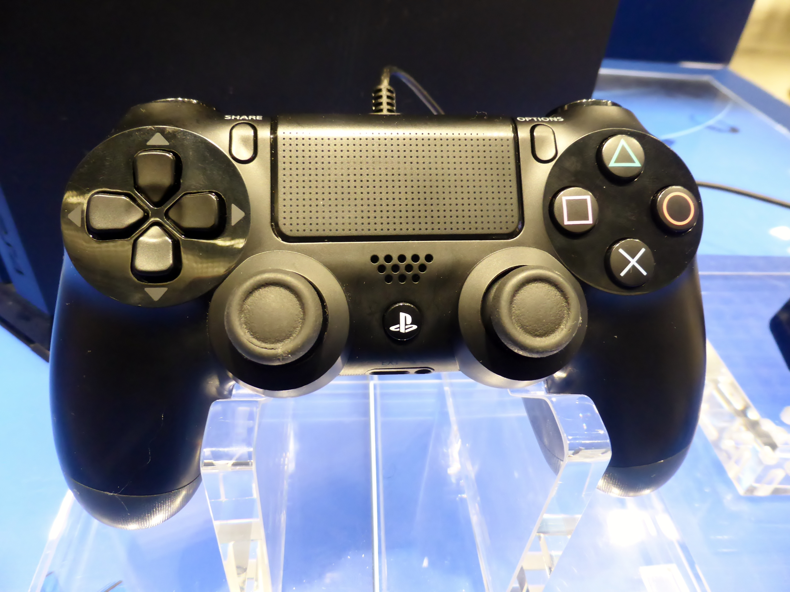 プレイステーション4のコントローラを撮影。